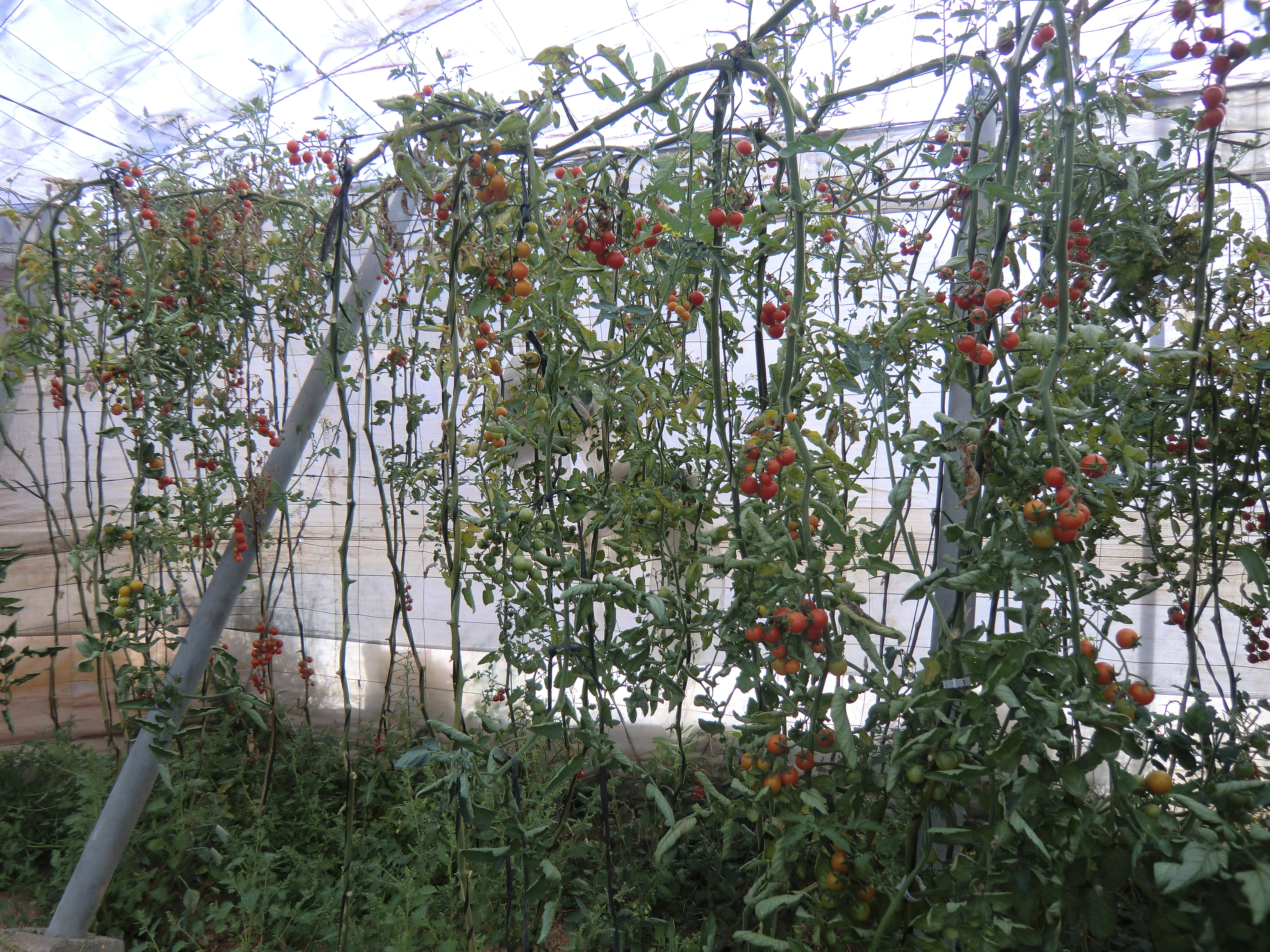 Invernadero cerca de los Albaricoques, con tomates cherry